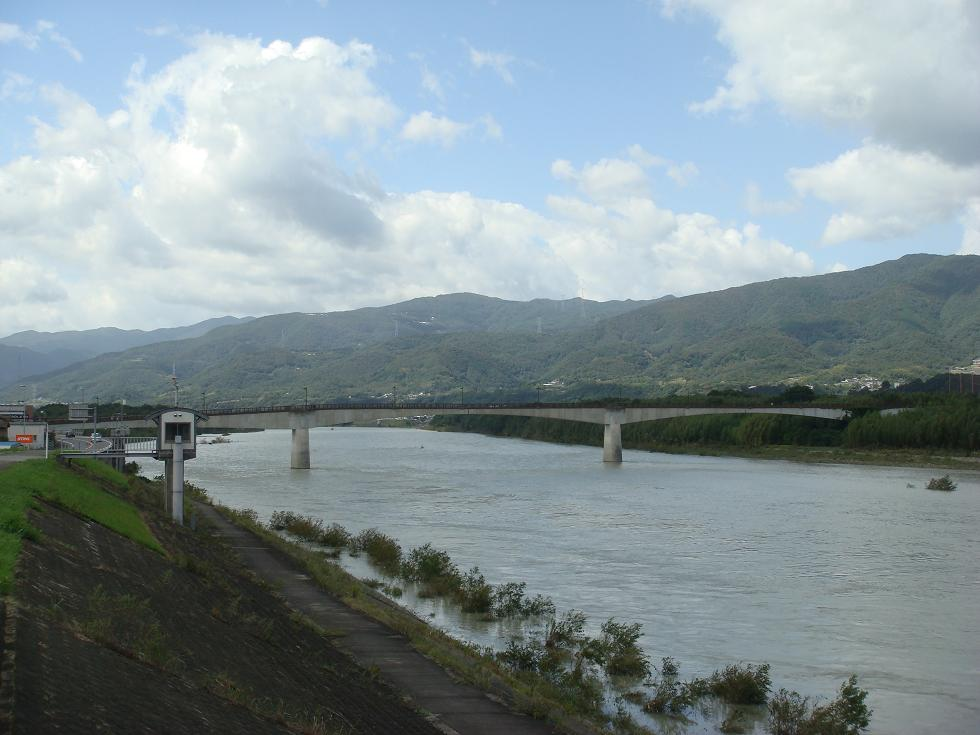 徳島県美馬市、吉野川に掛かる歩行者専用「ふれあい橋」